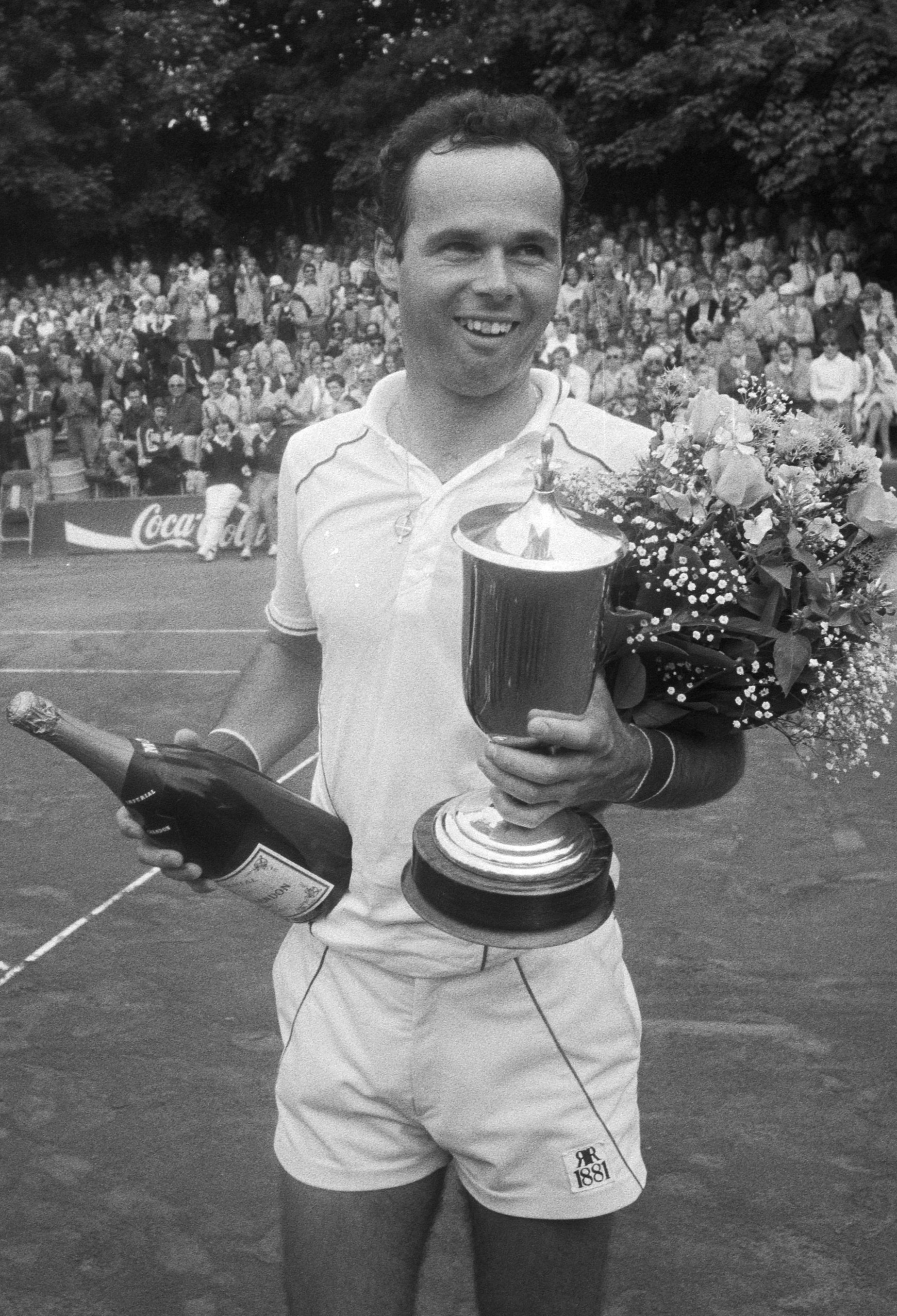 Balázs Taróczy lors de la finale à Hilversum en 1981.